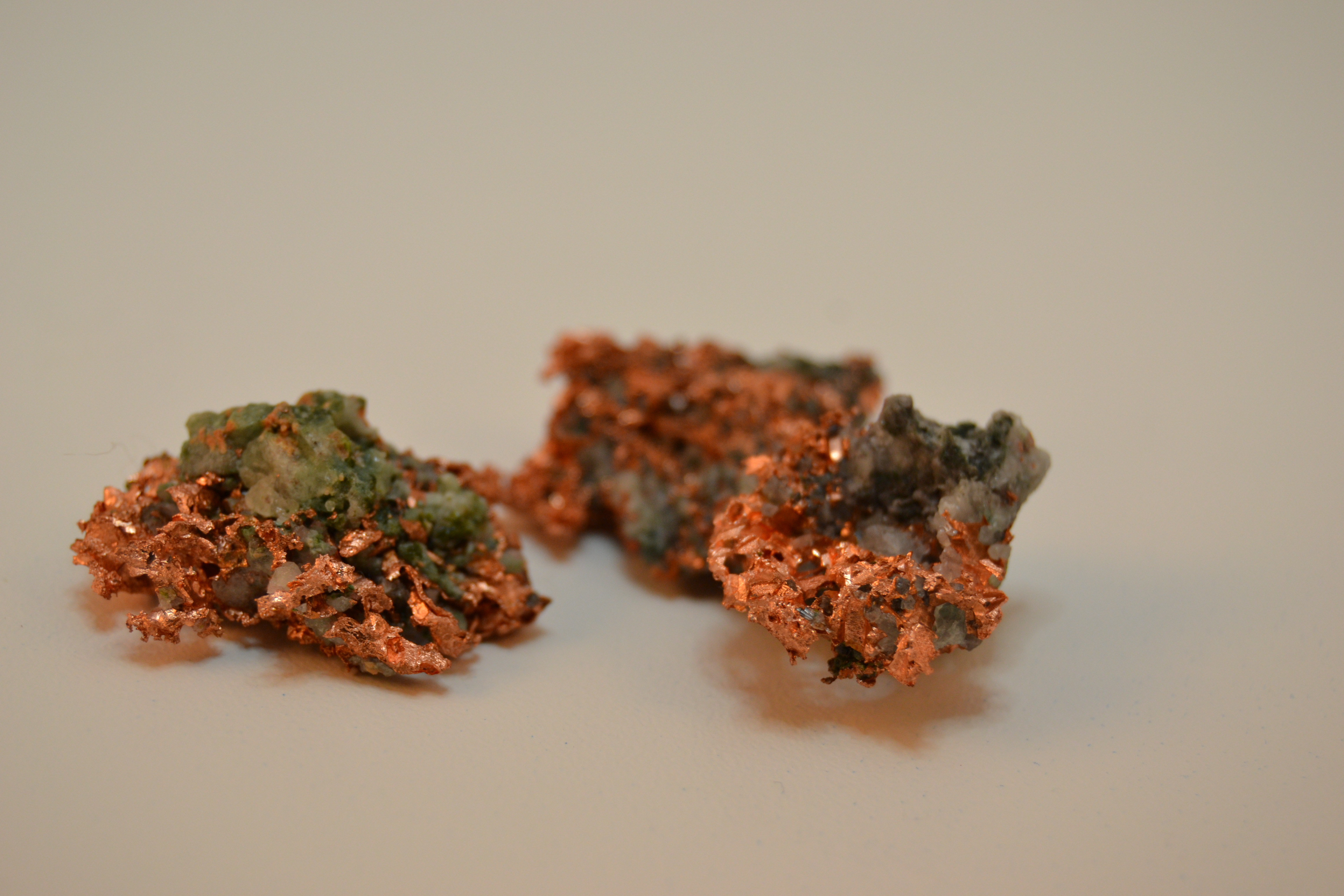 Kobber malm